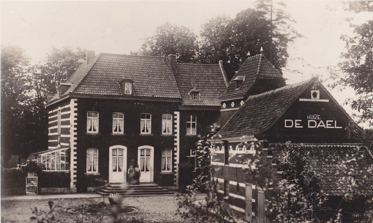 Huis de Dael Huis Oelsbroeck Nuth